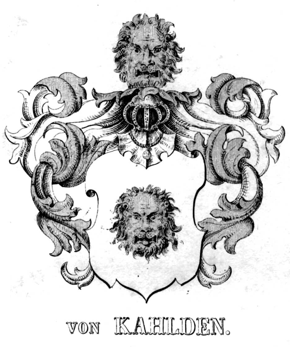 Wappen derer von Kahlden.